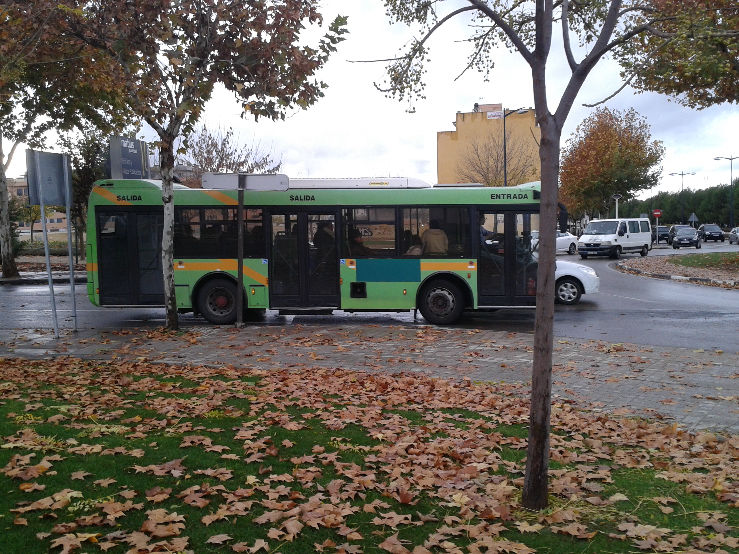 Autobús urbano de la línea 3